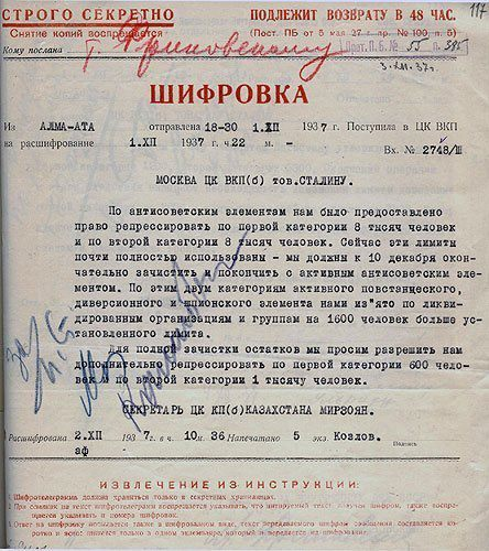 Шифровка адресованная товарищу Сталину. от 1 декабря 1937 года.